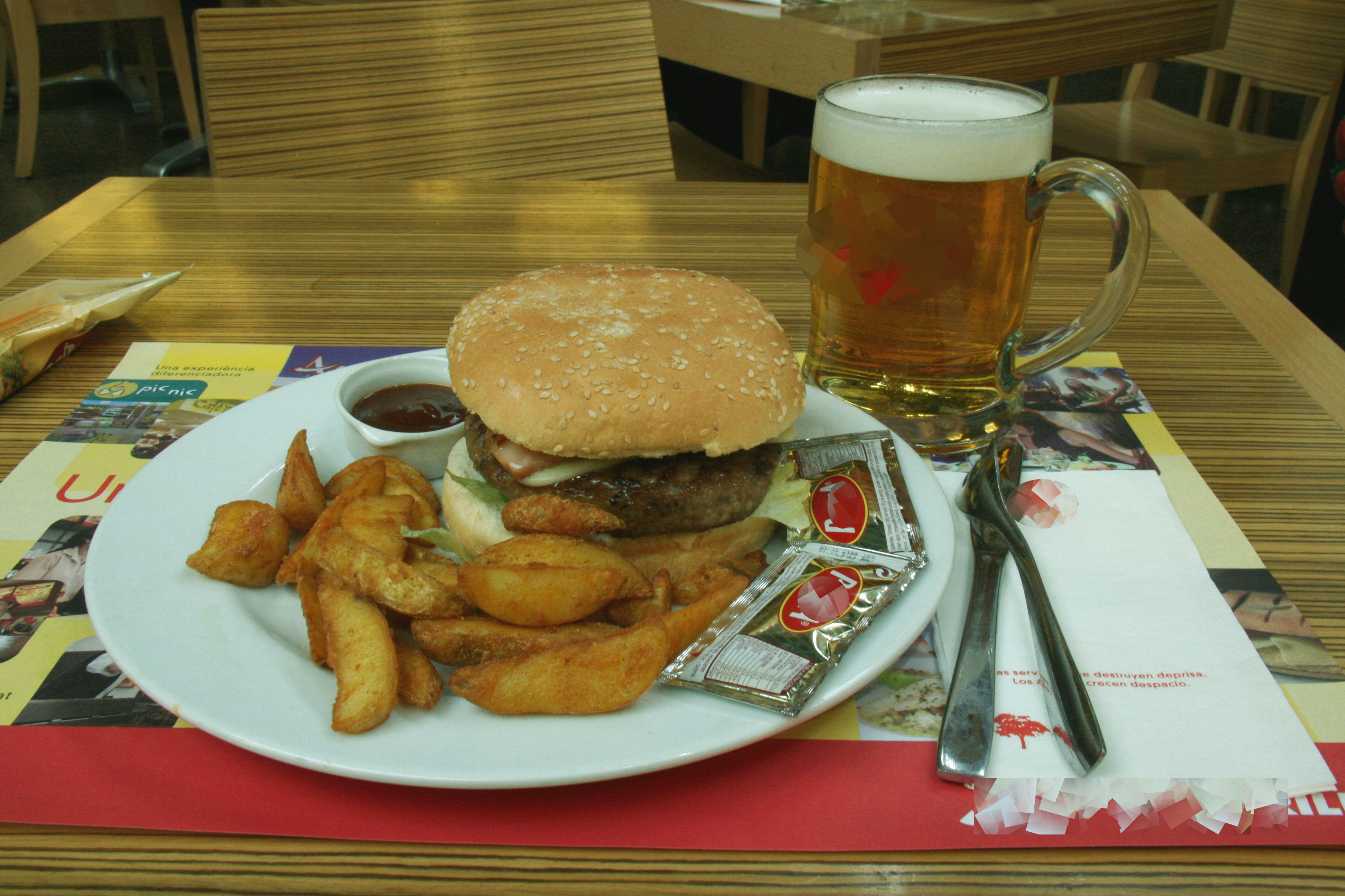 Hamburguesa de menú combinado - Jarra de cerveza